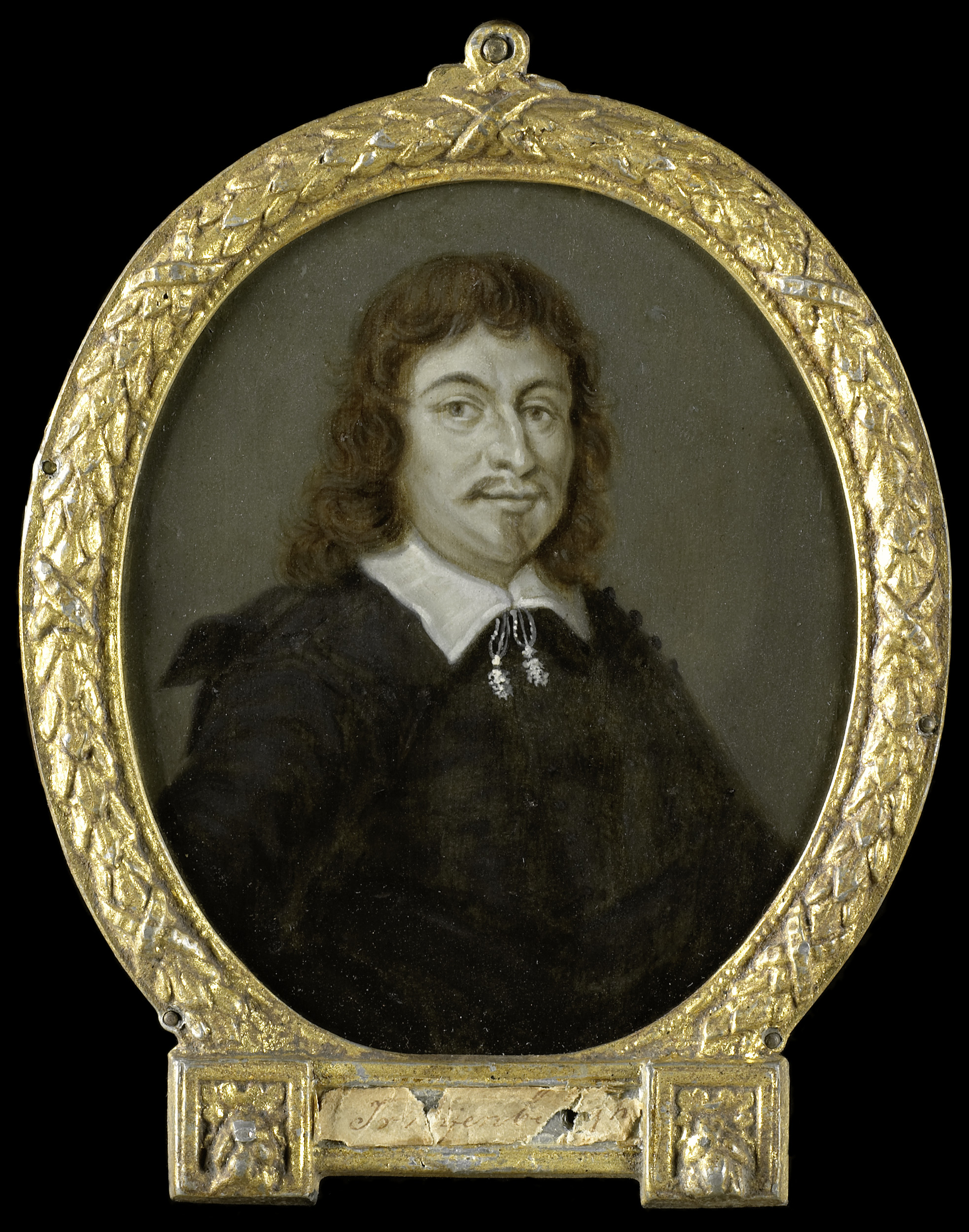 Portret van Johan van Nijenborgh (1620-70). Dichter te Groningen. Buste in ovaal, naar rechts. Vervaardigd naar een anonieme prent. Onderdeel van een verzameling portretten van Nederlandse dichters. Collection: schilderijen; Panpoeticon Batavum